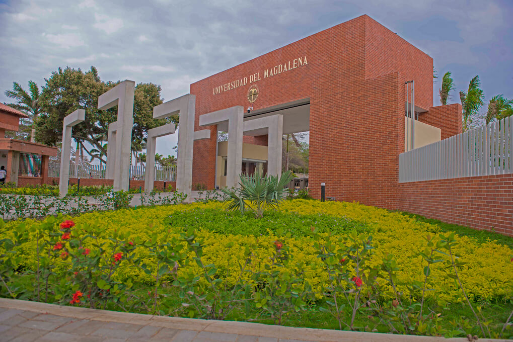 Acceso Peatonal